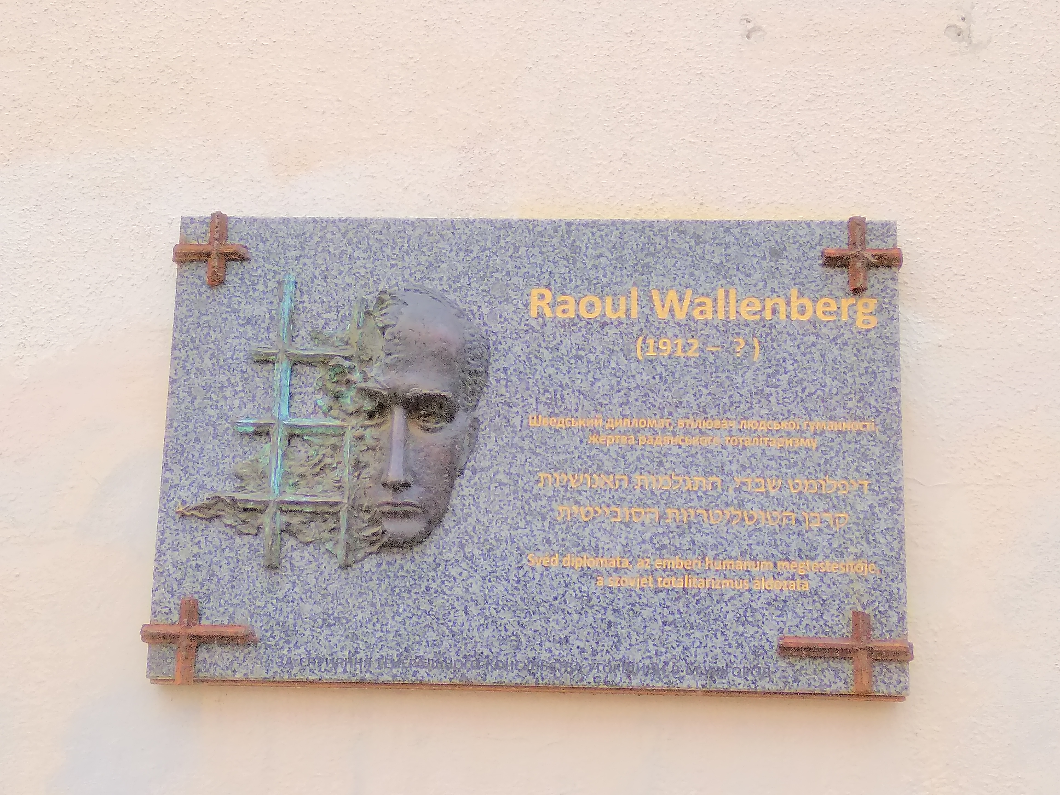 Меморіальна дошка Раулю Валленбергу, Ужгород, вул. Волошина 32, Закарпатська область